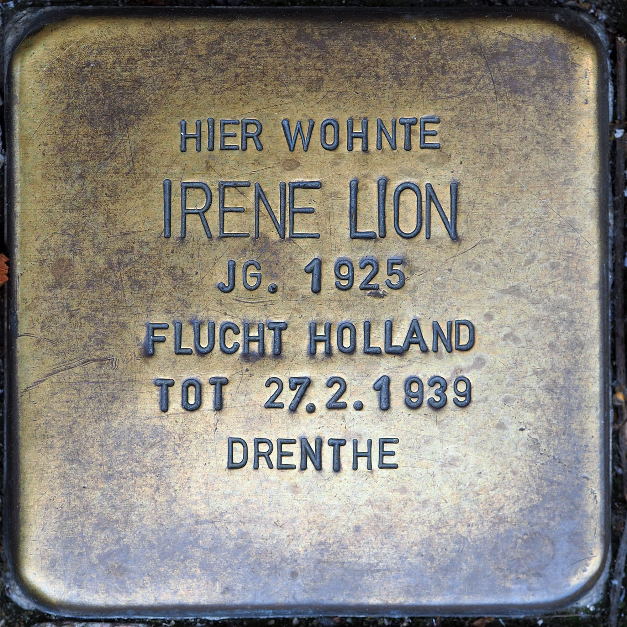 Stolpersteine Wesel: Lion, Irene